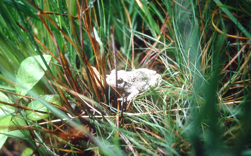 Crapaud alyte (Alytes obstetricans) photographié dans les Landes humides paratourbeuses du Plateau d'helfaut (Pas de Calais, France). (Diapositive scannée)